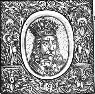 Václav II.